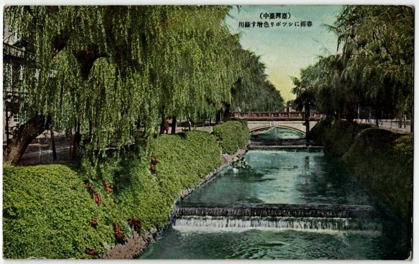 中文（台灣）: 臺灣臺中日本時代綠川明信片